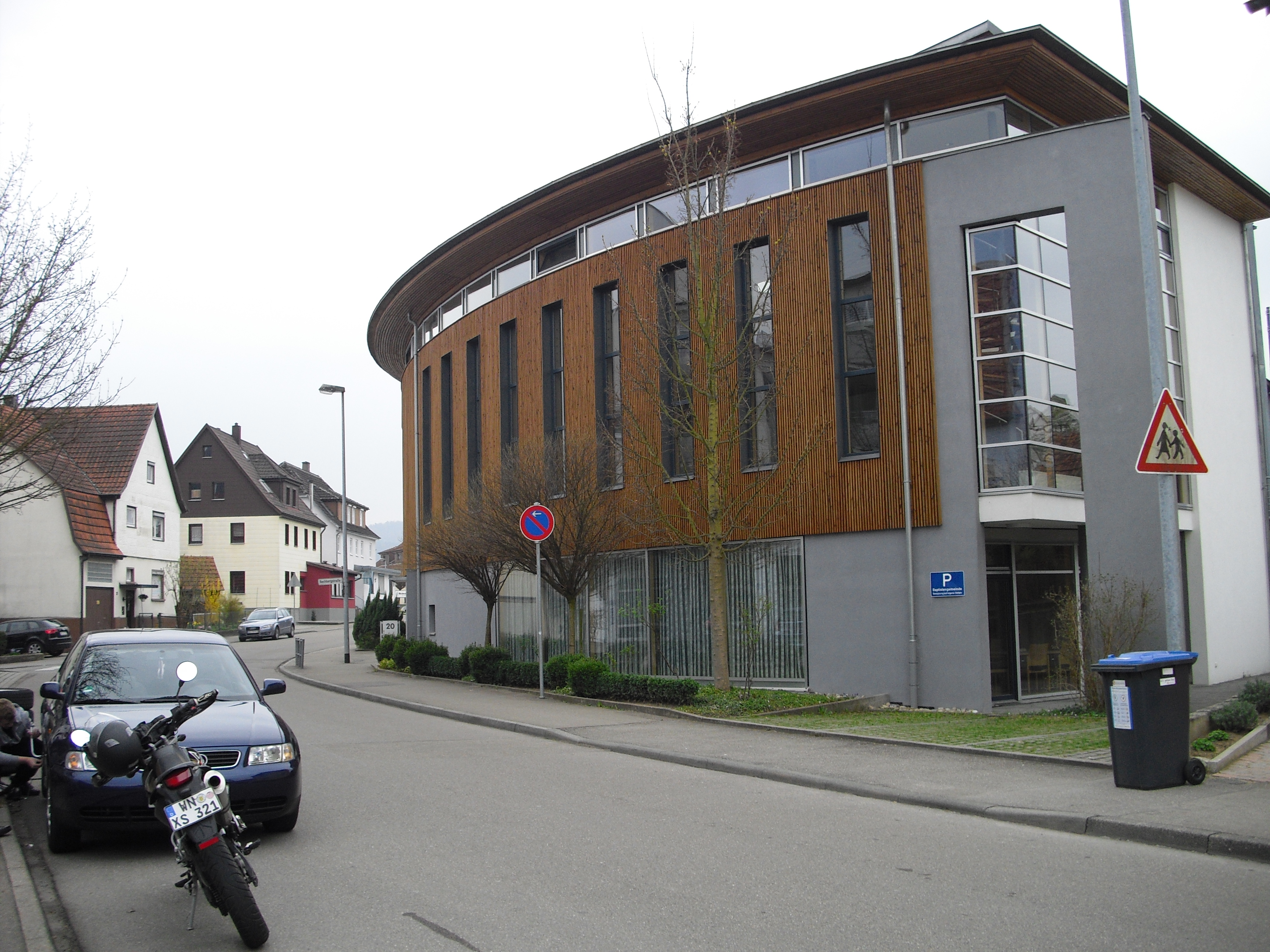 Kirche der Baptistengemeinde Urbach